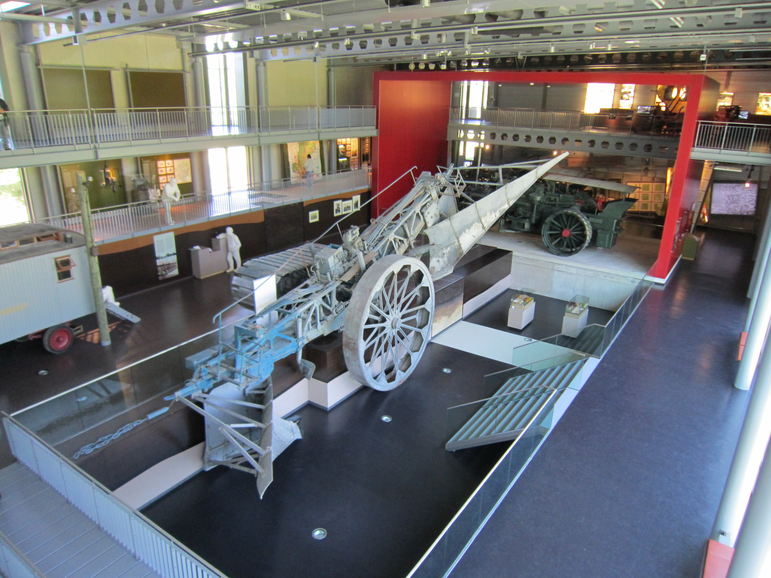 "Mammut"-Moorpflug in Ausstellungshalle 2 des Emsland-Moormuseums in Groß-Hesepe